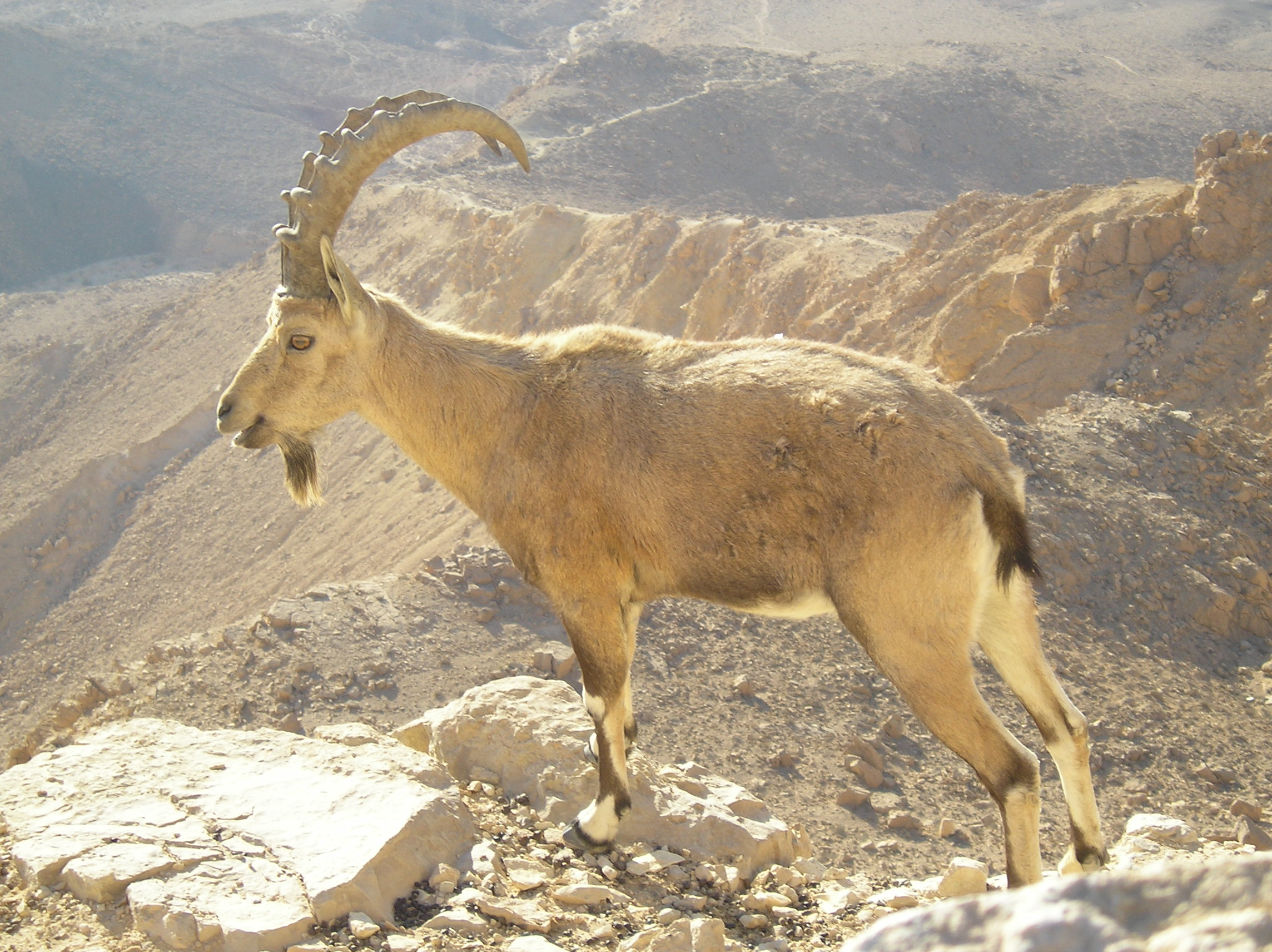 Nubian Ibex in Negev